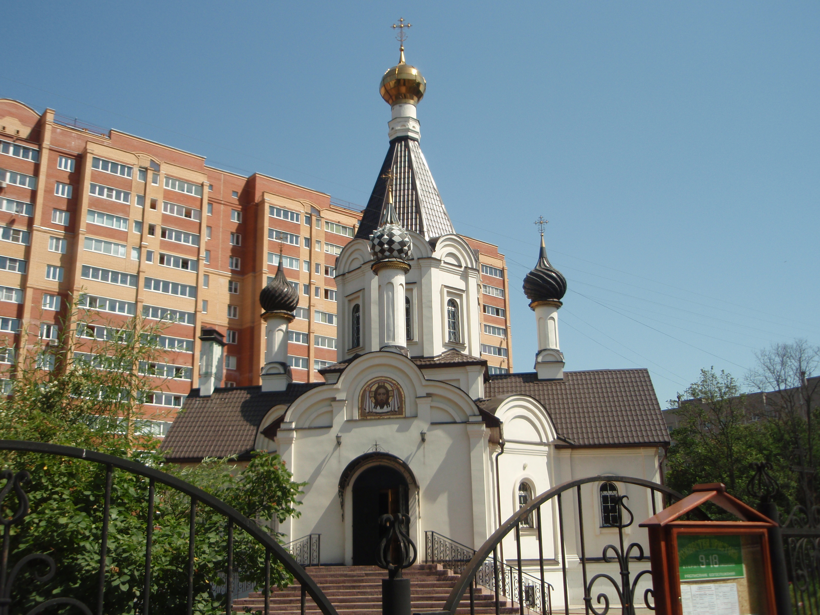 Церковь Рождества Христова в микрорайоне Центральный города Домодедово